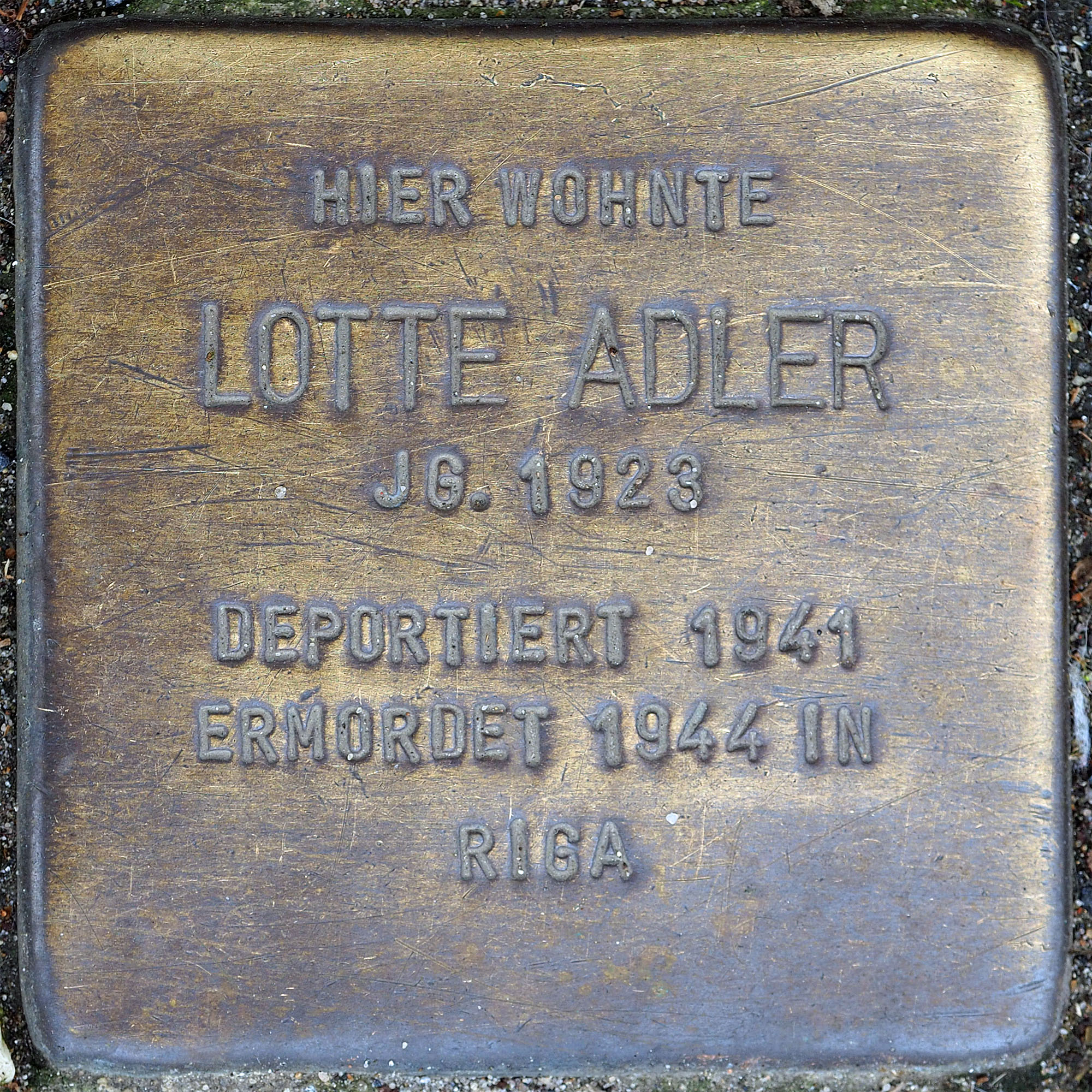 Stolpersteine MG: Adler, Lotte